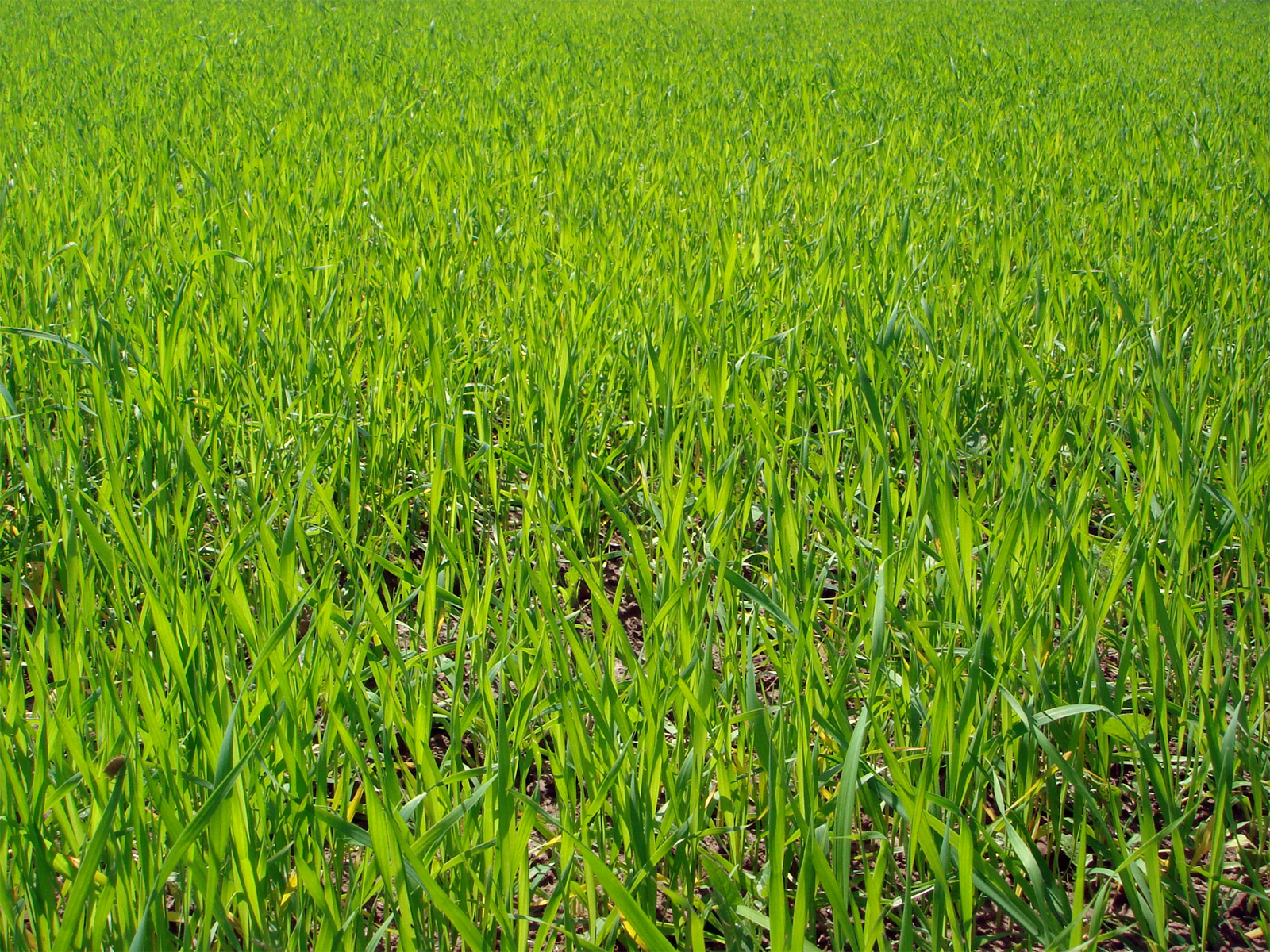 Трава (поле близ деревни Крутая Кстовского района Нижегородской области).